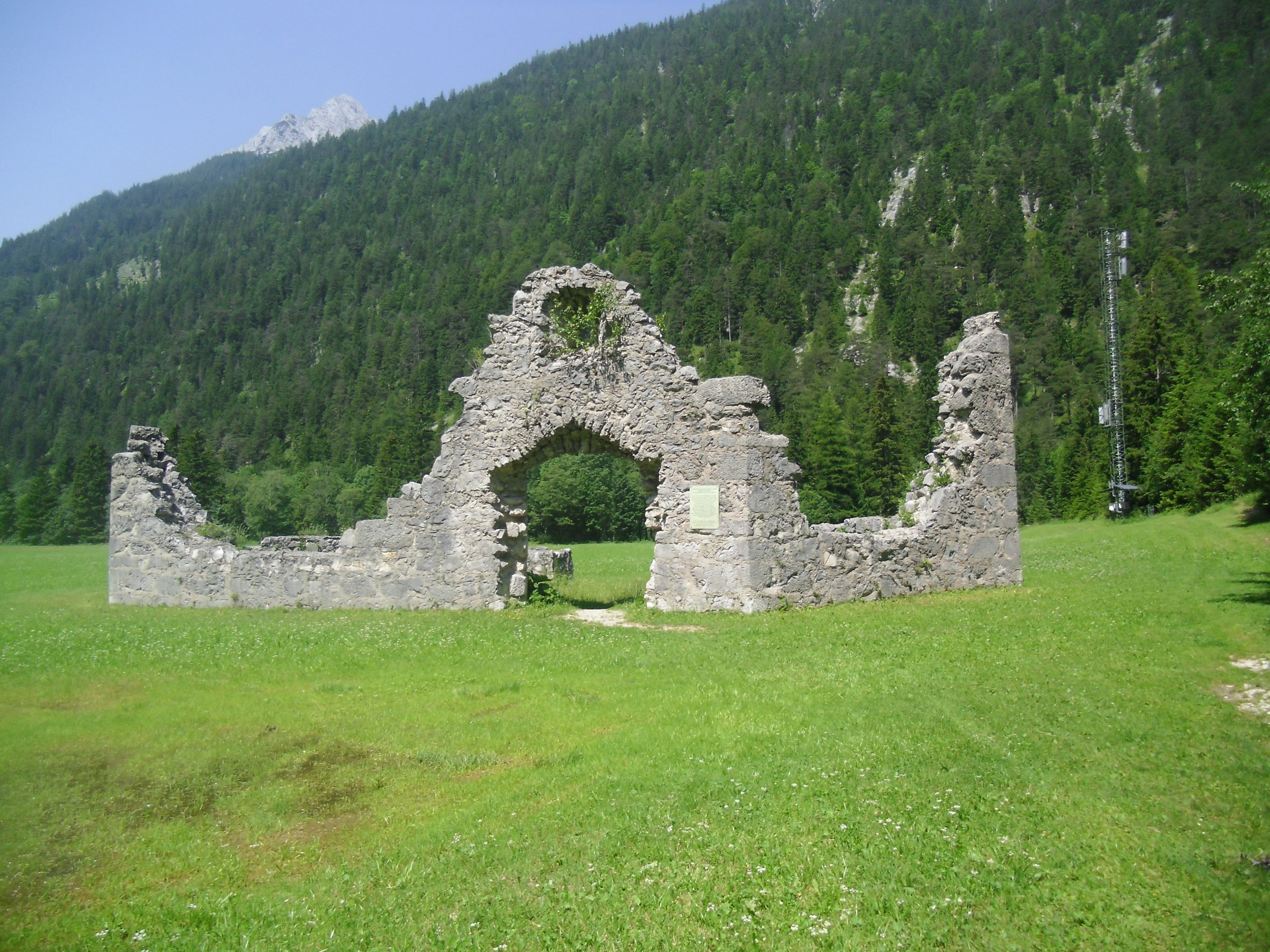 Ruine Porta Claudia in Leutasch.